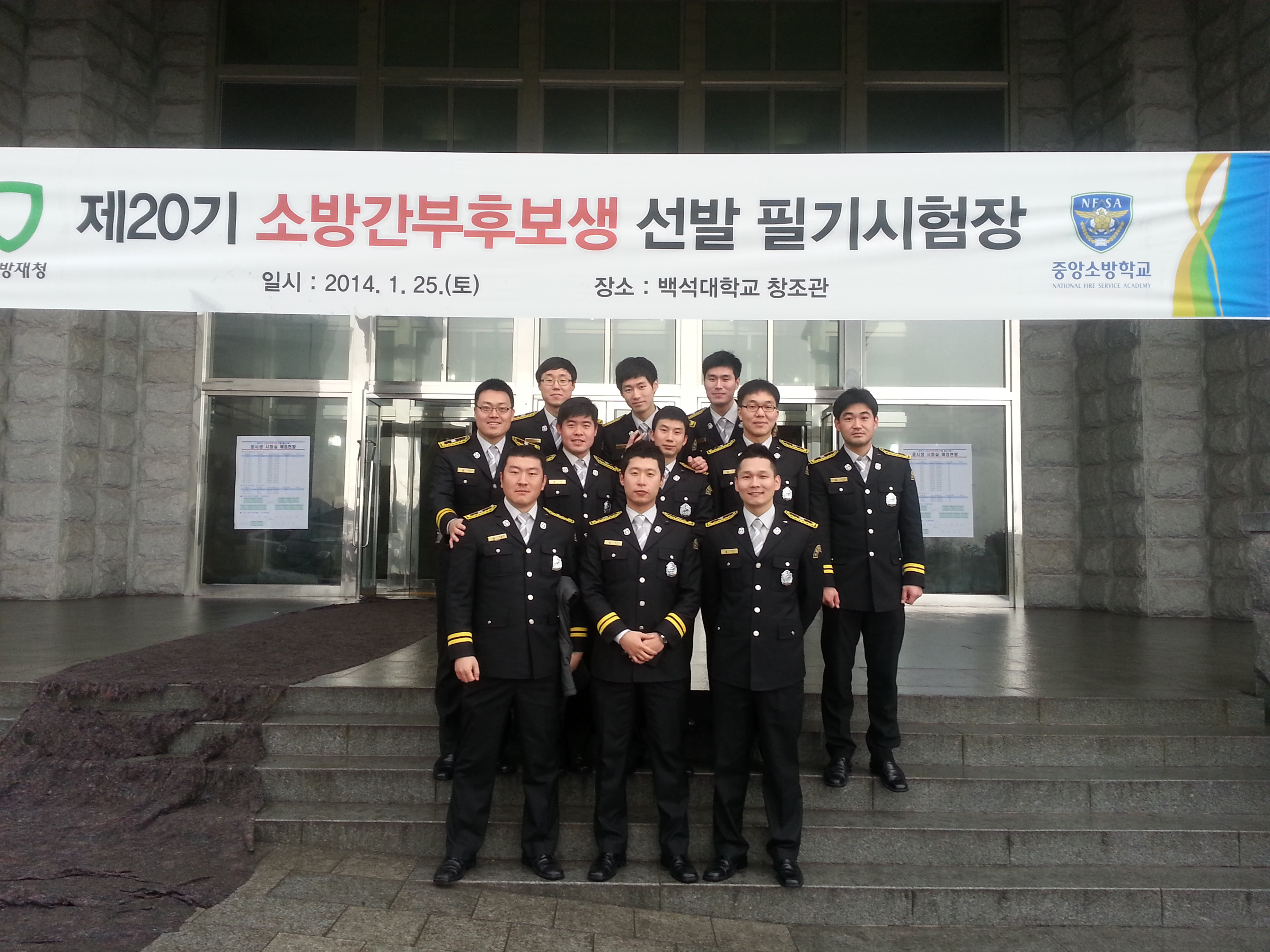 제19기 소방간부후보생